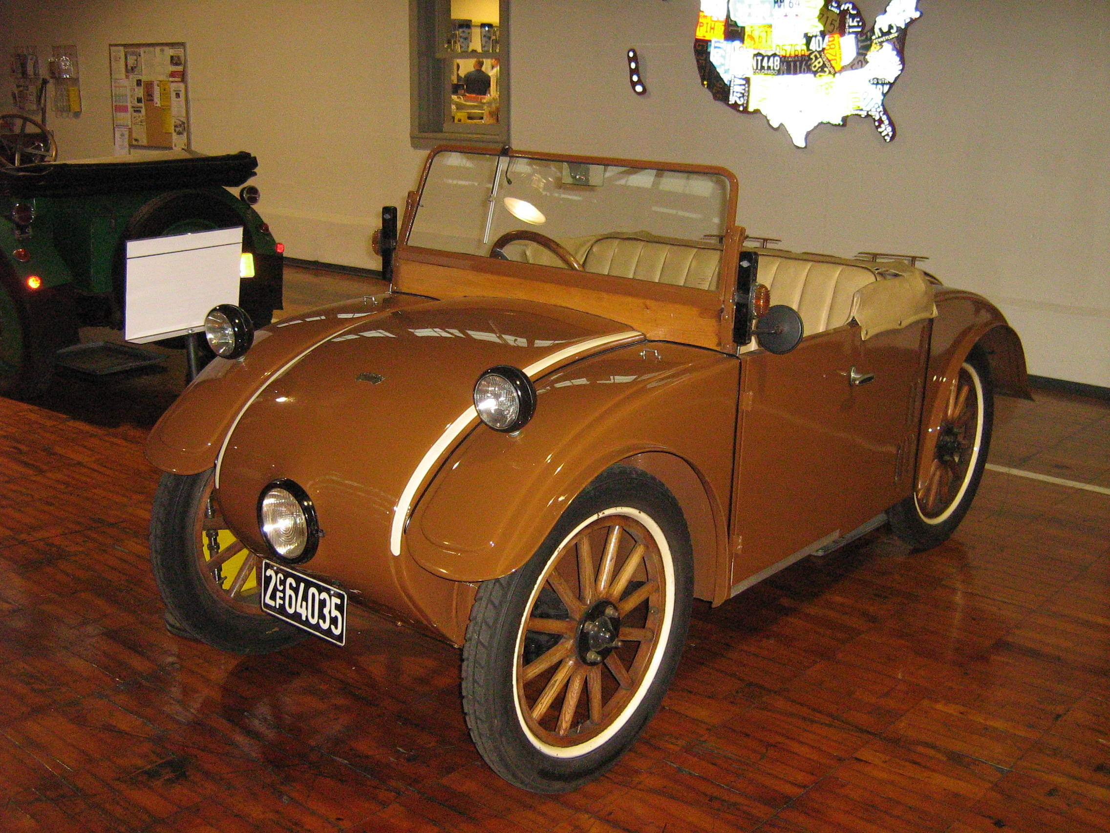 1926 Hanomag 2-10